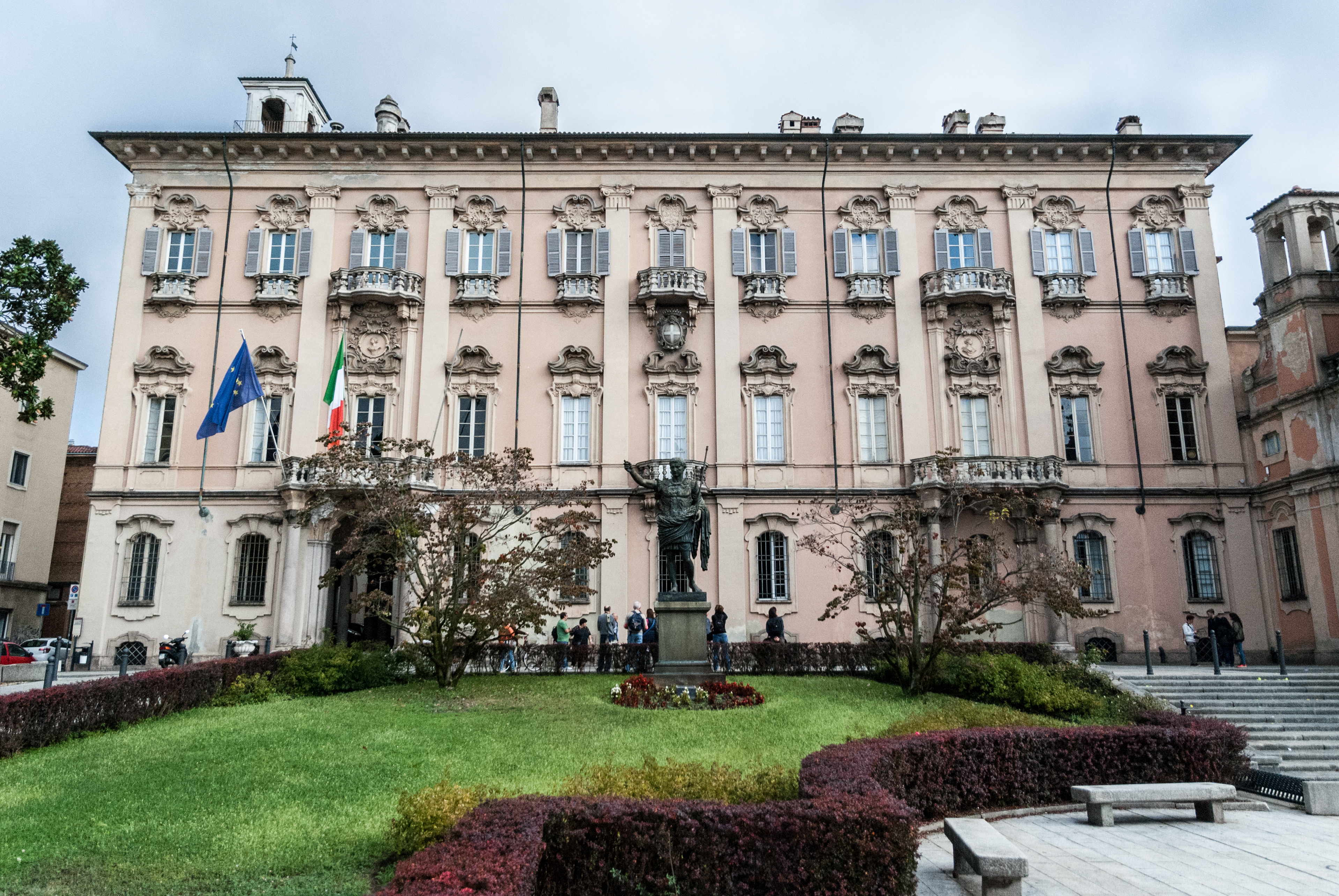 Palazzo Mezzabarba This is a photo of a monument which is part of cultural heritage of Italy.